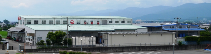 光食品上板工場